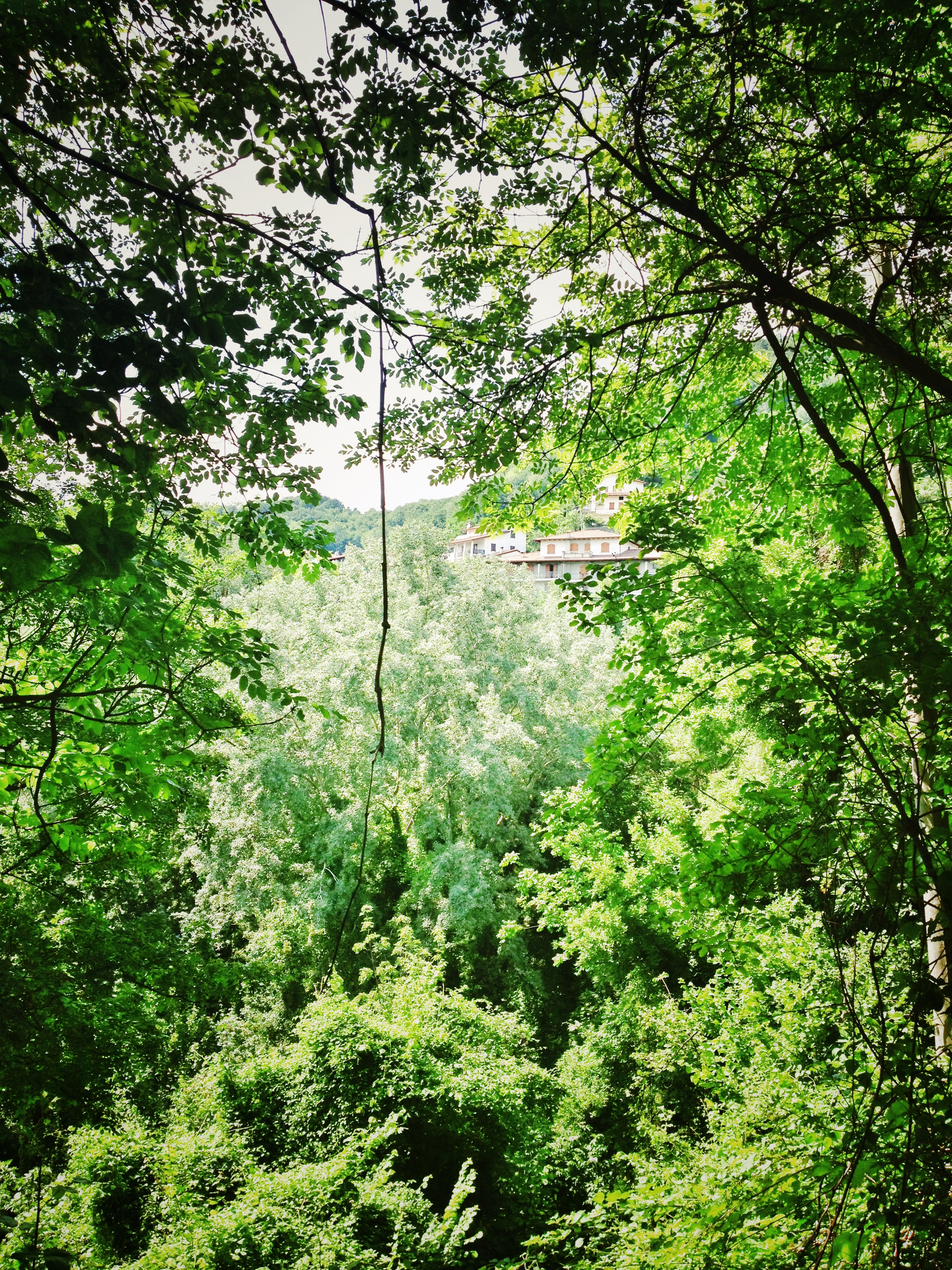 Costabeorchia, Pinzano al Tagliamento, Italy